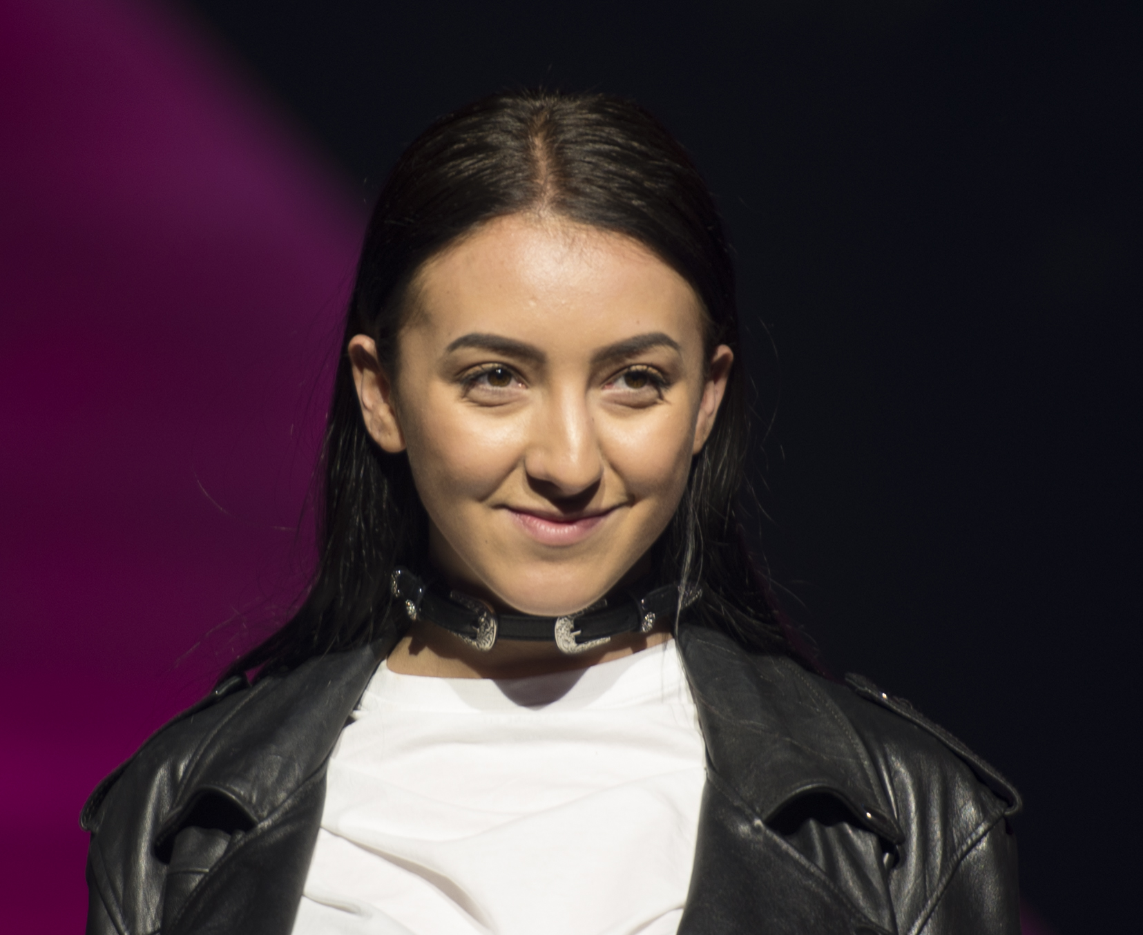 Adrijana Krasniqi på en presskonferens under första deltävlingen av Melodifestivalen 2017 i Göteborg.